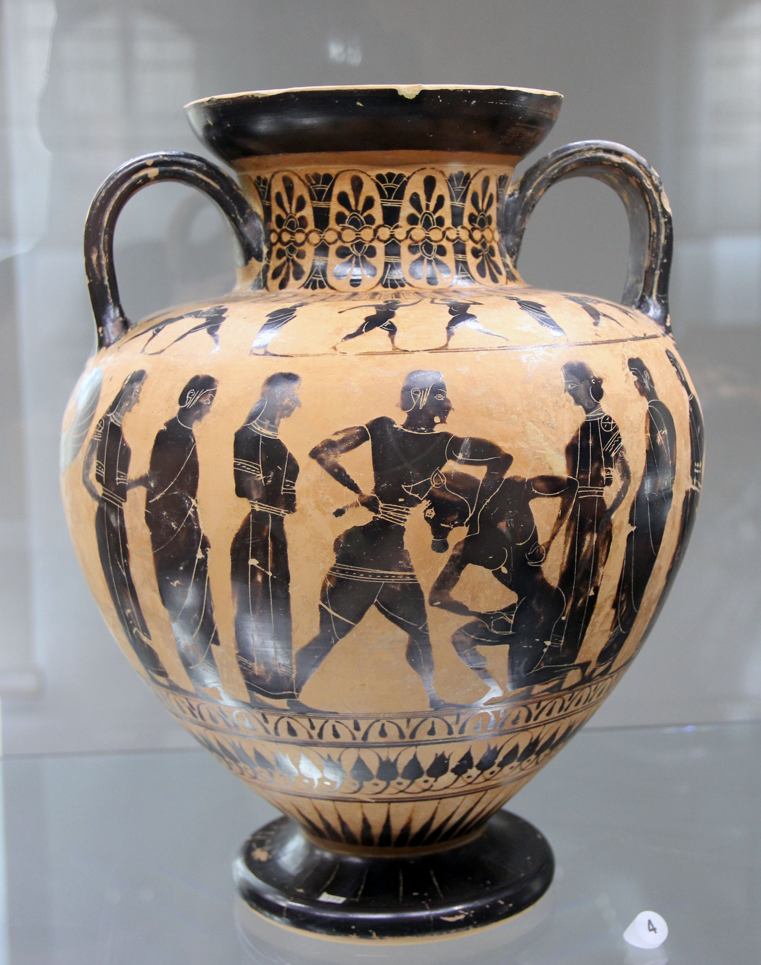 Thésée et le Minotaure. Vers -550. Musée national d'archéologie de l'Ombrie